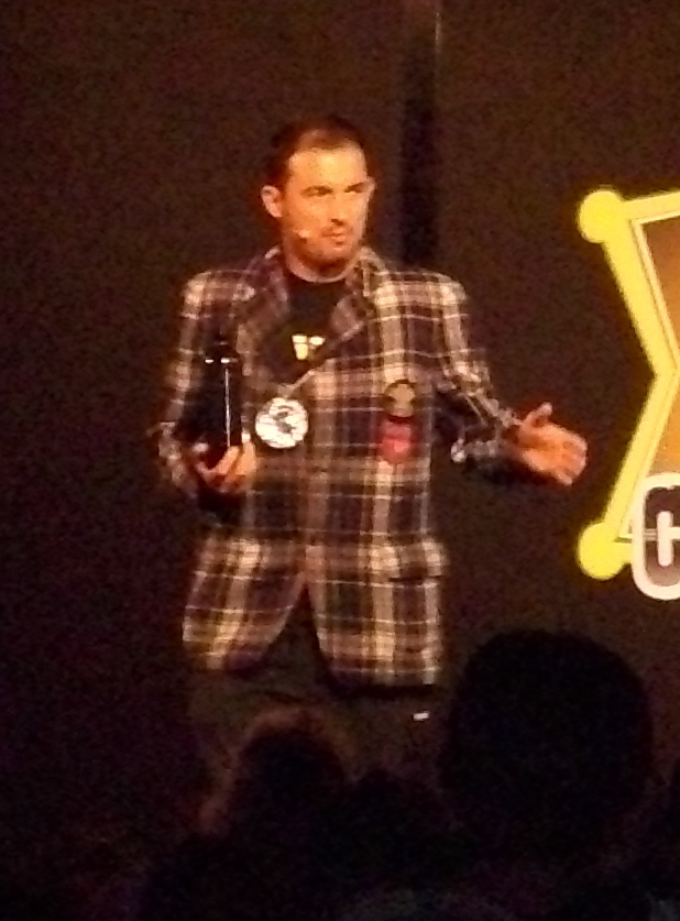 Gianluca Impastato in esibizione a Genova nella zona del Porto Antico, con il gruppo comico dei Turbolenti